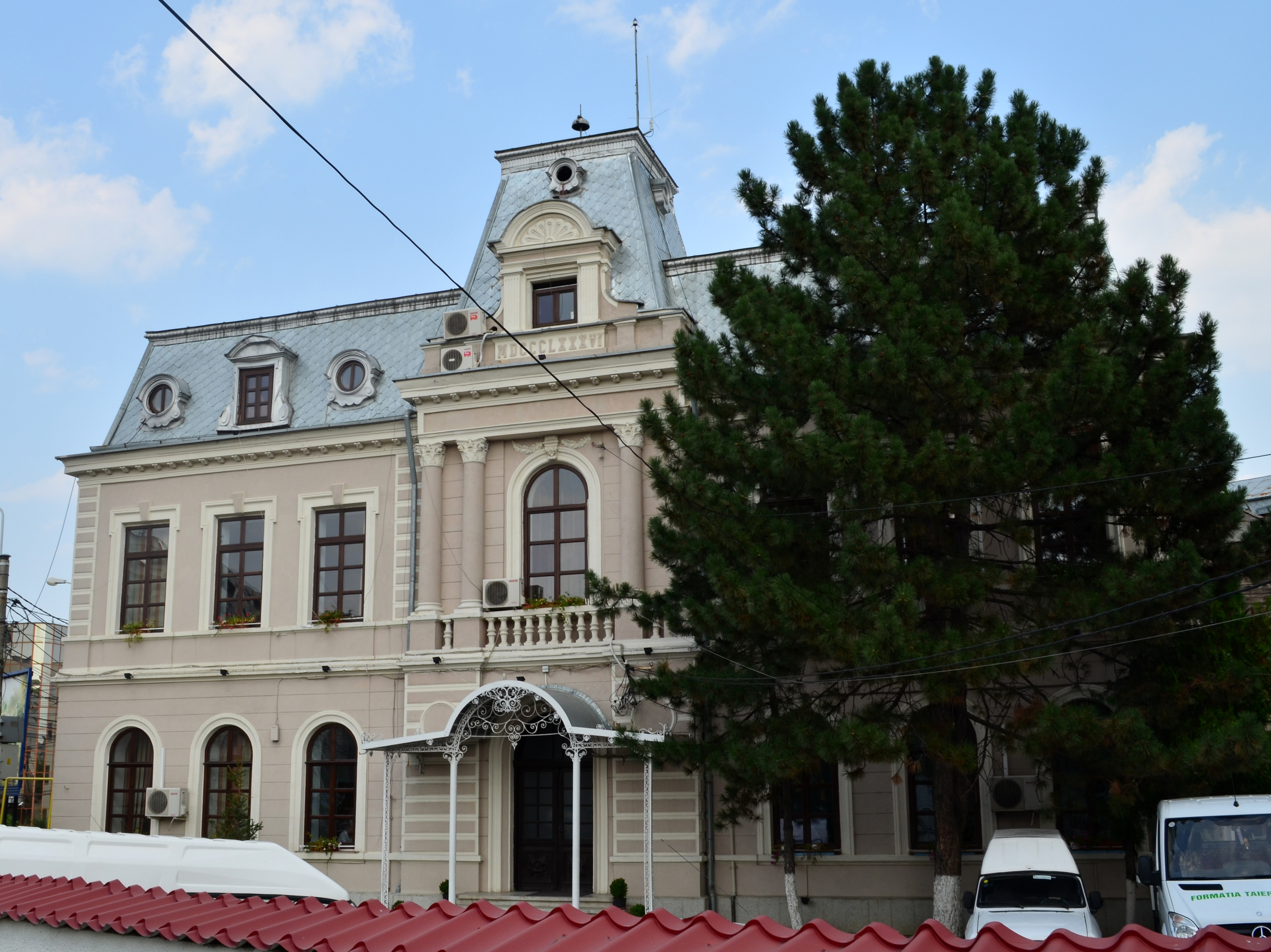 Școala de Arte și Meserii, azi sediul SC Servicii de Gospodărire Urbană Ploiești SRL (fosta Administrația Domeniului Public și Privat Ploiești), Str. Văleni nr. 32